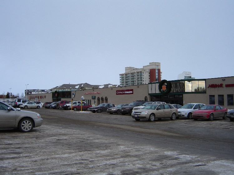 Market Mall, Nutana Suburban Centre, Nutana Suburban Development Area, Saskatoon, Saskatchewan, Canada